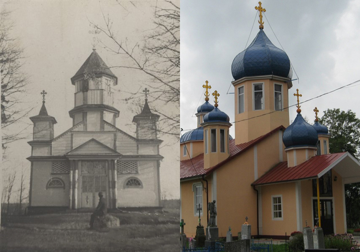 Беларуская (тарашкевіца): Маскалізацыя (русіфікацыя) Вялікага Княства Літоўскага. Вёска Гошчава Слонімскага павету. Крыжаўзьвіжанская царква, помнік традыцыйнай беларускай драўлянай архітэктуры з элемэнтамі стылю клясыцызму: аўтэнтычны выгляд (налева) і па частковым руйнаваньні ў выніку маскоўскай перабудовы (направа)